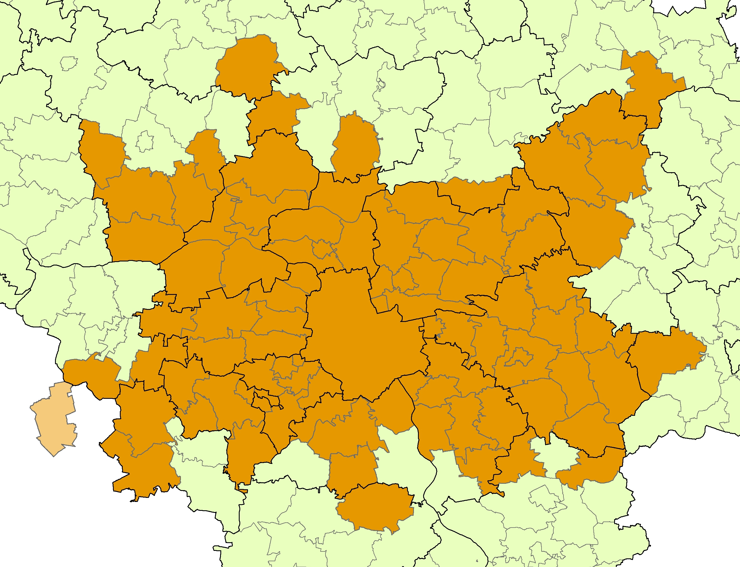 Szersza strefa miejska Warszawy wyznaczona w 2012 roku